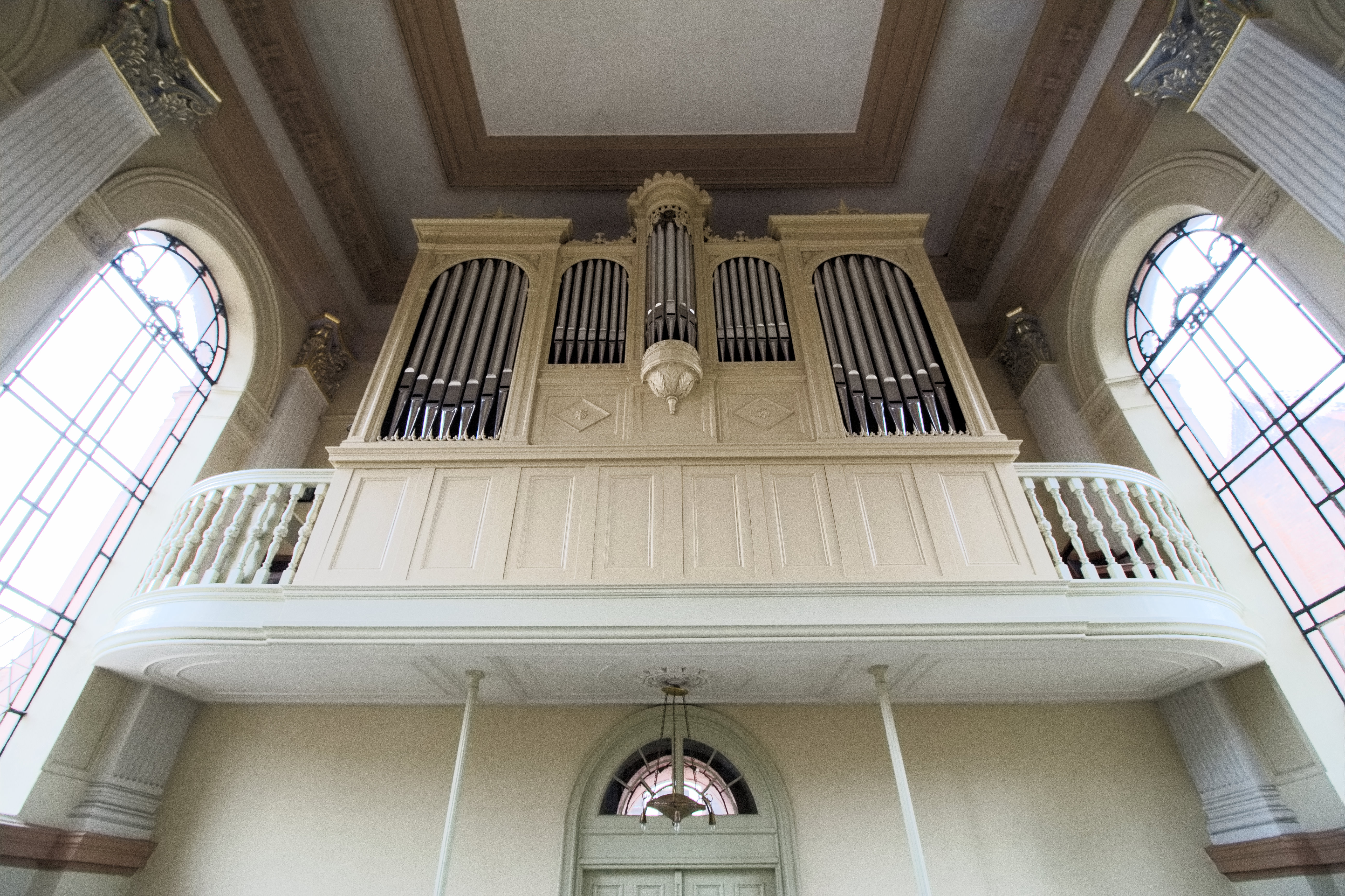 Friedrichstadt (Schleswig-Holstein): Remonstrantenkirche, Innenansicht